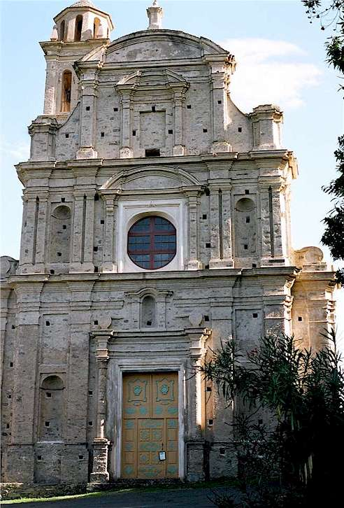 Kerk van Carcheto-Brusticu